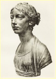 Clémentine Curial (1788-1840), amante di Stendhal